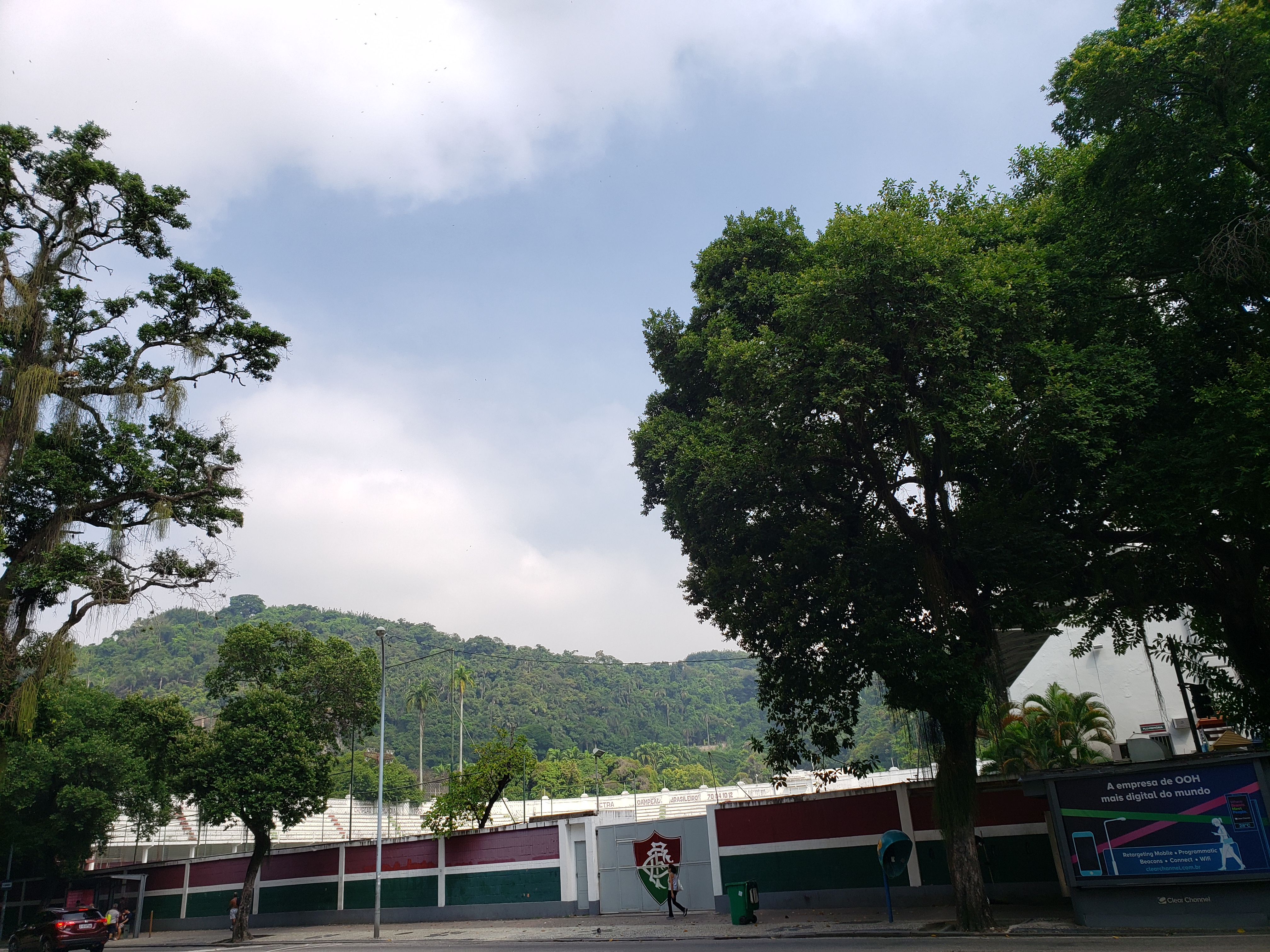 Estádio de Laranjeiras, do Fluminense Football Club, visto da Rua Pinheiro Machado.